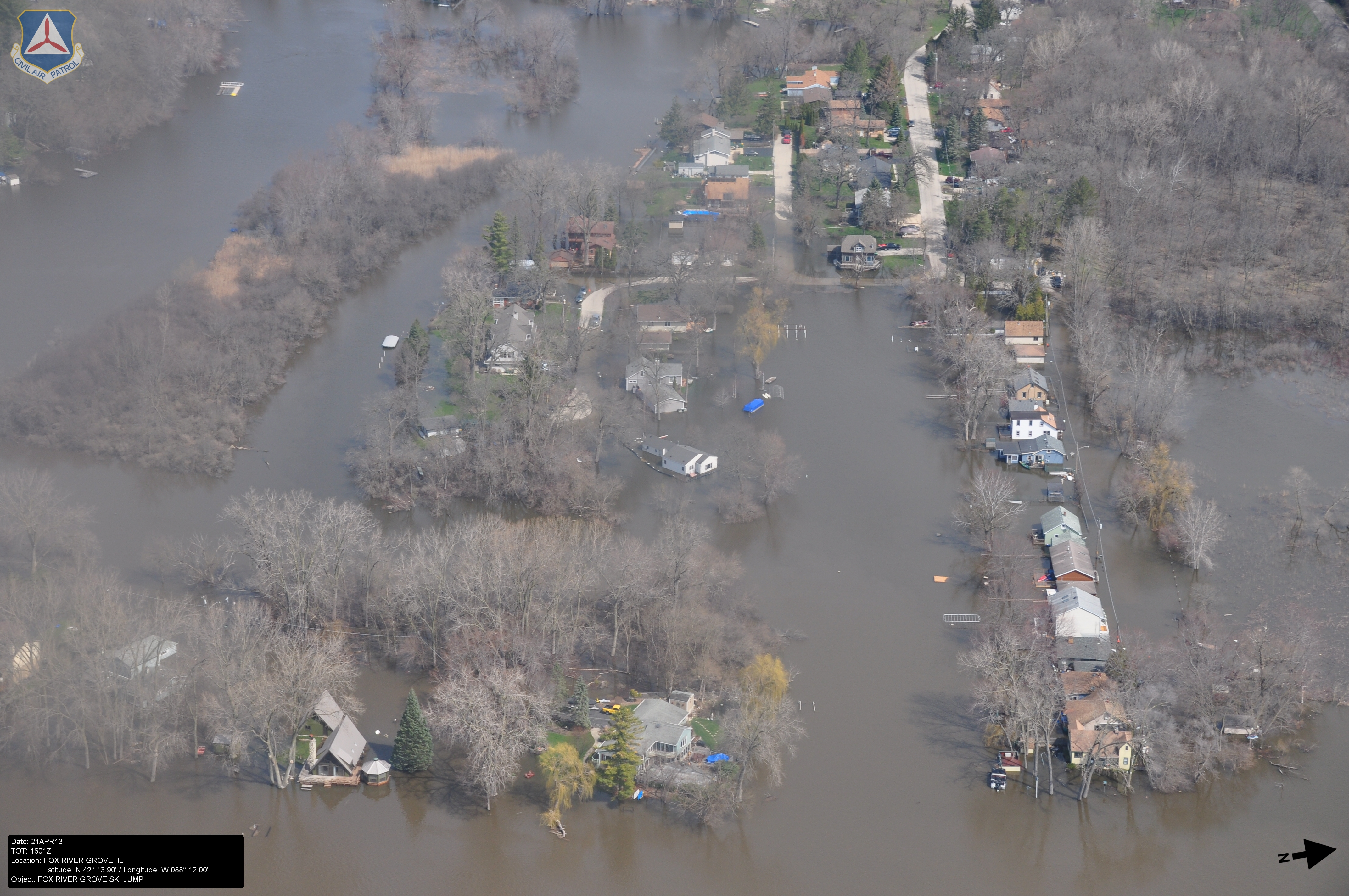 Fox River Grove Ski Jump